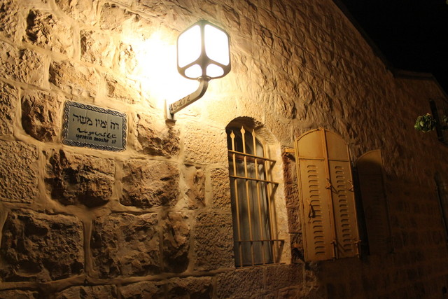 טחנת הרוח במשכנות שאננים שוכנת בכניסה לשכונת משכנות שאננים בירושלים, והיא המבנה הראשון שנבנה בה ב-1858. שימשה כטחנת קמח למשך כשני עשורים. כיום משמשת כאתר תיירות פופולרי וממוקם בה מוזיאון לתולדות יוזם הטחנה סר משה מונטיפיורי.